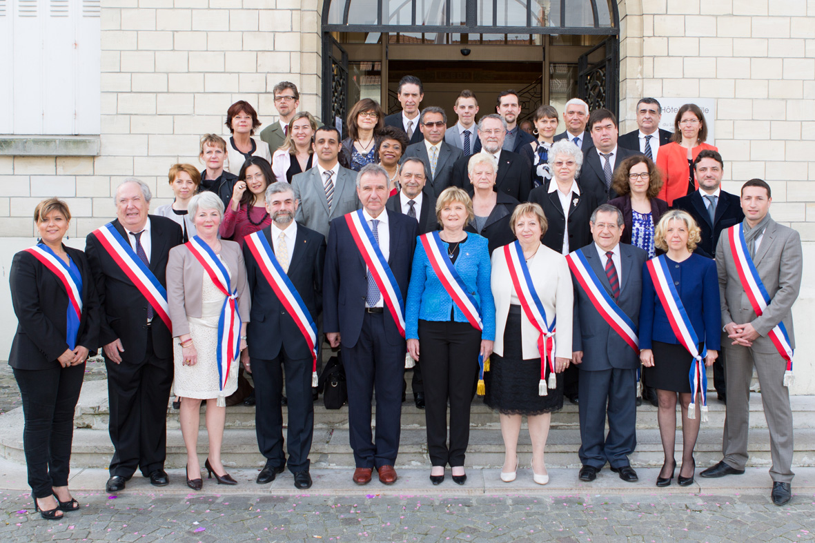 Conseil municipal Deuil-La Barre 2014-2020